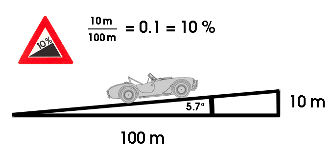 Verdeutlichung einer Steigung in Prozent (Dezimaltrennzeichen kann lokal abweichen, z. B. in: Albanien, Andorra, Argentinien, Belgien, Bolivien, Brasilien, Bulgarien, Chile, Dänemark, Deutschland, Ecuador, Estland, Färöer, Finnland, Frankreich, Georgien, Griechenland, Grönland, Indonesien, Island, Italien, Kanada (französisch-sprechender Teil), Kolumbien, Kroatien, Kuba, Lettland, Liechtenstein (ausgenommen Geldbeträge), Litauen, Luxemburg, Mazedonien, Moldawien, Niederlande, Norwegen, Österreich, Paraguay, Peru, Polen, Portugal, Rumänien, Russland, Schweden, Schweiz (ausgenommen Geldbeträge und Koordinaten), Serbien, Simbabwe, Slowakei, Slowenien, Spanien, Tschechien, Türkei, Ukraine, Ungarn, Uruguay, Venezuela, Weißrussland), Picture to the slope of a road